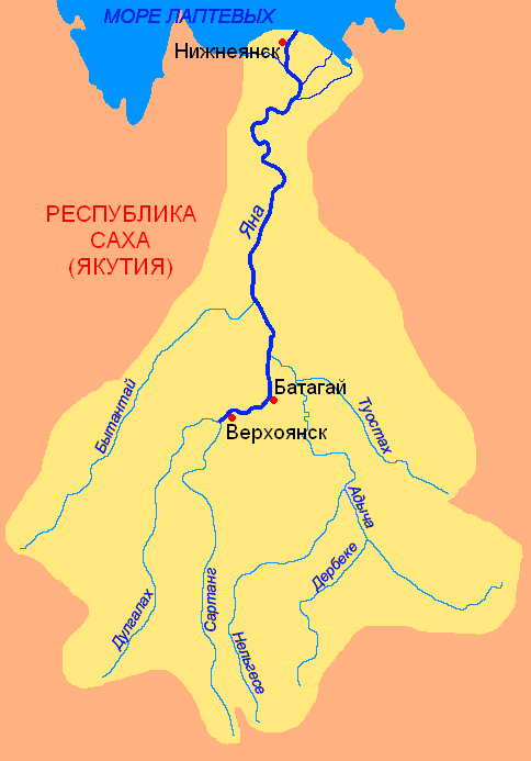 Схема бассейна реки Яна